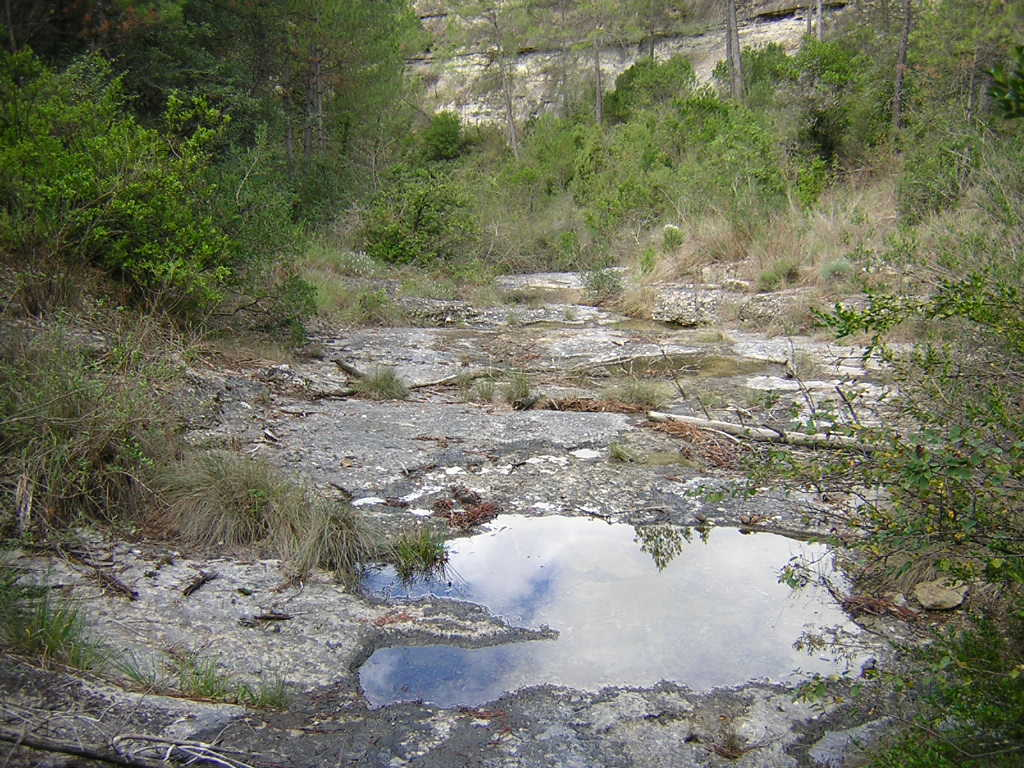 La llera del torrent de Bellveí